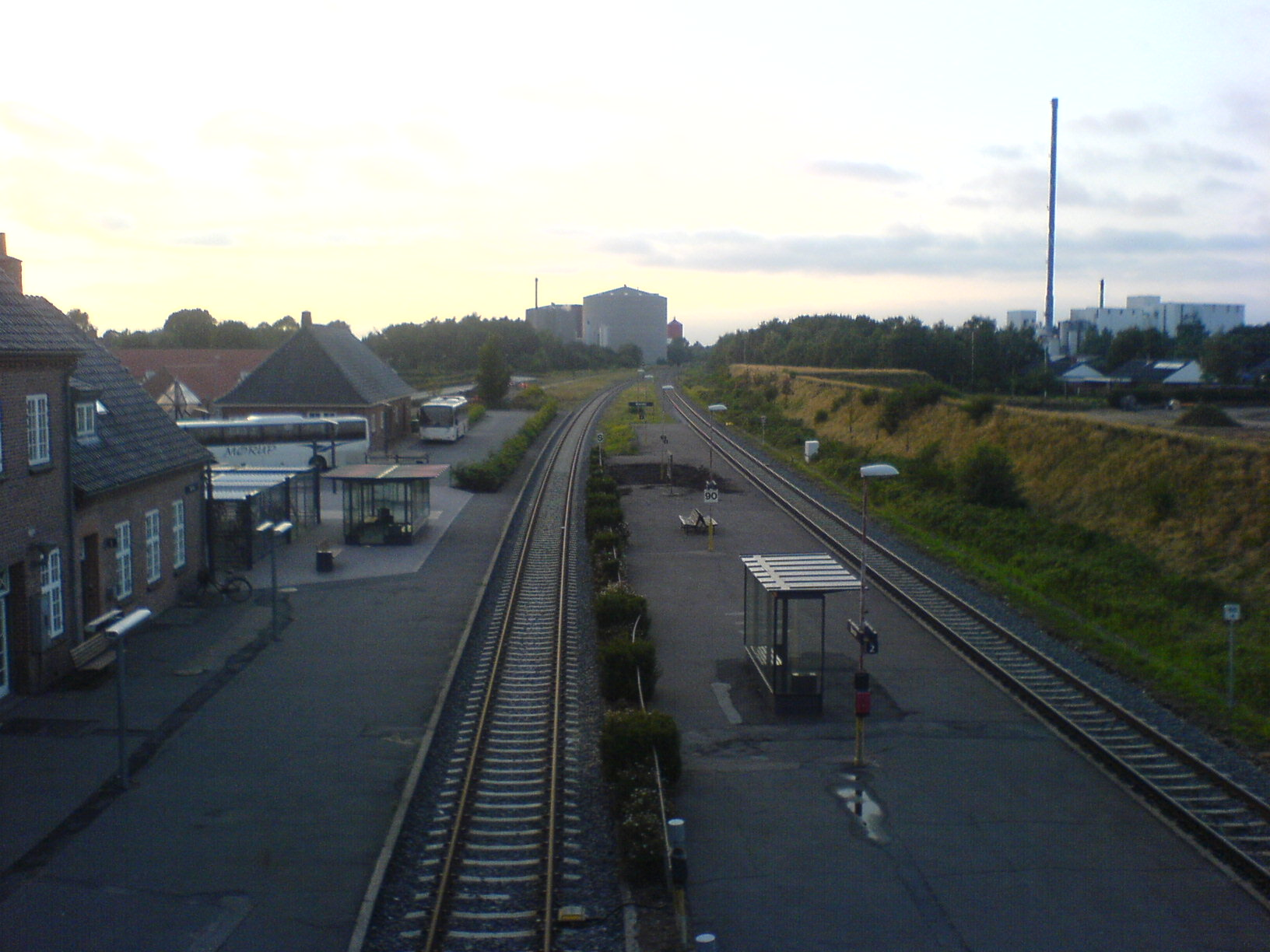 Brande Station set fra gangbroen mellem RemisenBrande og stationen. Kameraet peger mod nord, dvs. mod Herning.